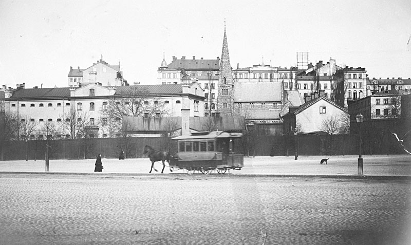 Länscellfängelset och Engelska kyrkan från Norra Bantorget Fotonummer Posc 981